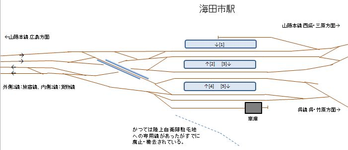 海田市駅配線図